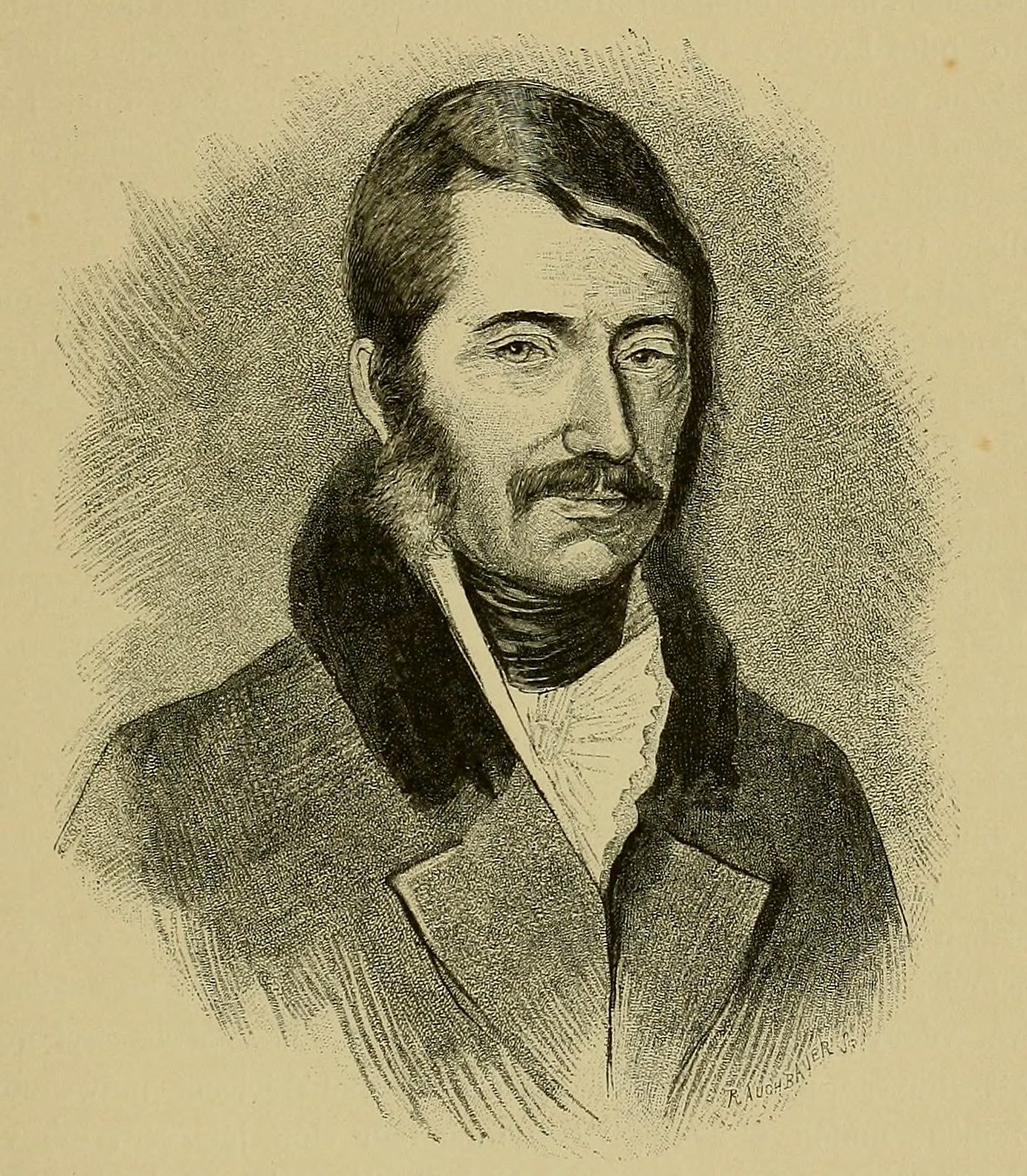 Lavotta János portréja. Vágó Pál rajza